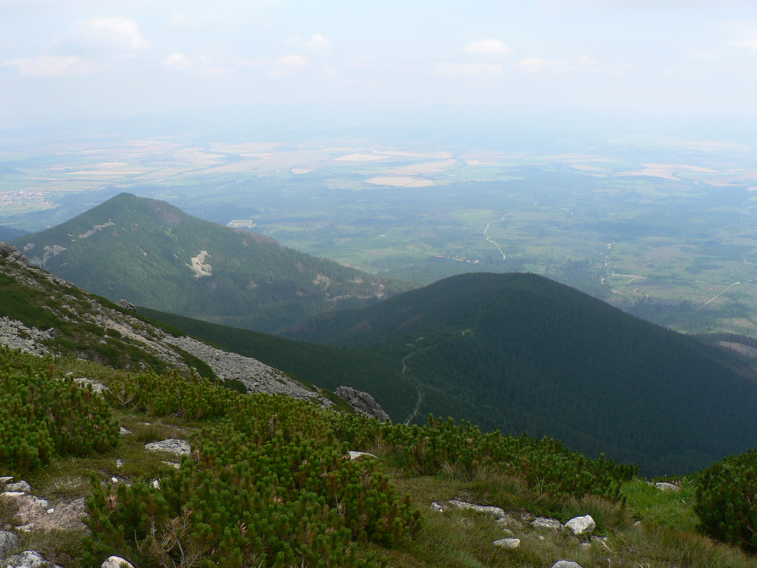 Steżki i Mała Rakuska Czuba z Rakuskiej Czuby